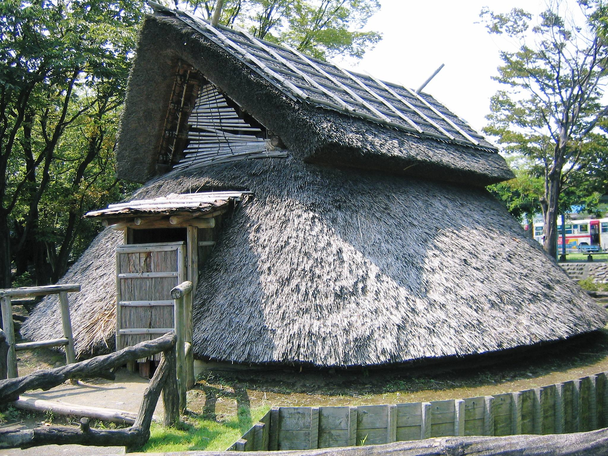 竪穴式住居(登呂遺跡) 撮影場所:静岡県静岡市登呂5丁目登呂公園内 撮影者:Vihiqebia 撮影日:2004年8月25日